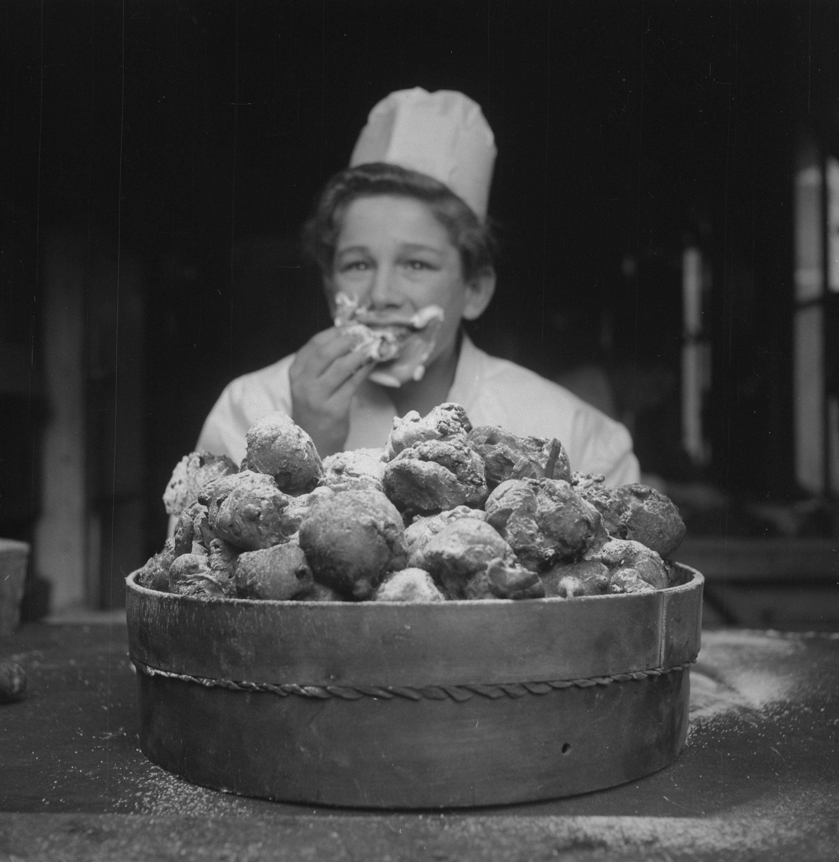 Collectie / Archief : Fotocollectie Anefo Reportage / Serie : [ onbekend ] Beschrijving : Koekebakker bakt oliebollen Datum : 29 december 1948 Trefwoorden : OLIEBOLLEN Fotograaf : Noske, J.D. / Anefo Auteursrechthebbende : Nationaal Archief Materiaalsoort : Negatief (zwart/wit) Nummer archiefinventaris : bekijk toegang 2.24.01.03 Bestanddeelnummer : 903-1664